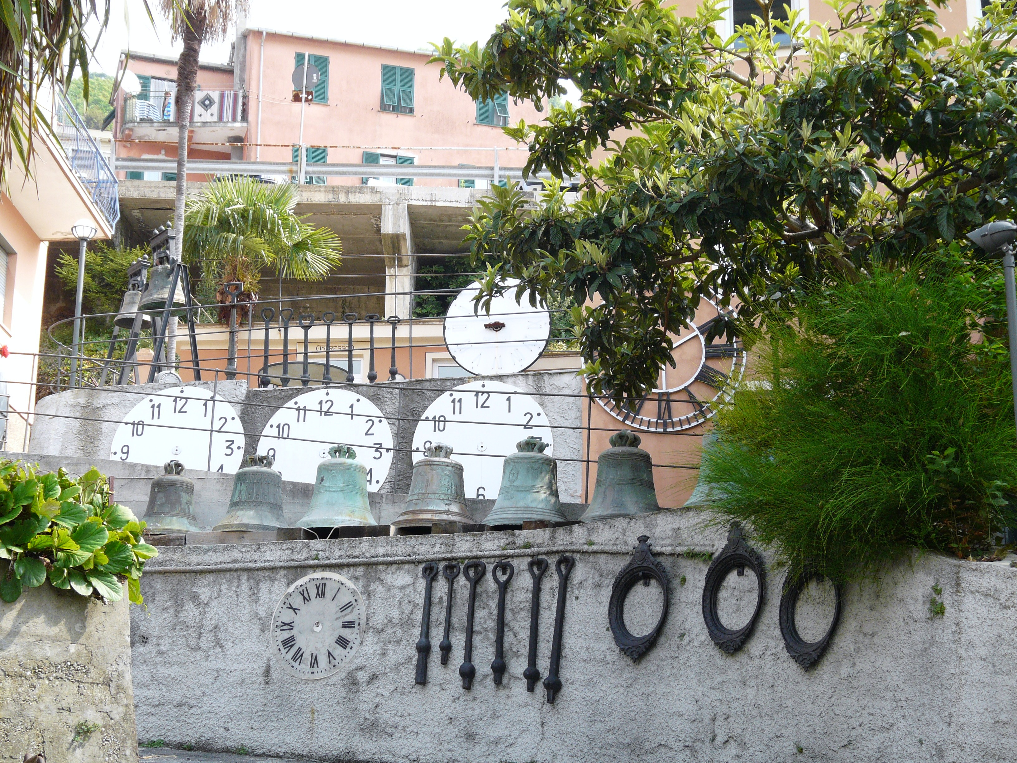 Particolari di campane e componenti presenti all'esterno del Museo dell'orologio da torre "Roberto Tubino" di Uscio, Liguria, Italia